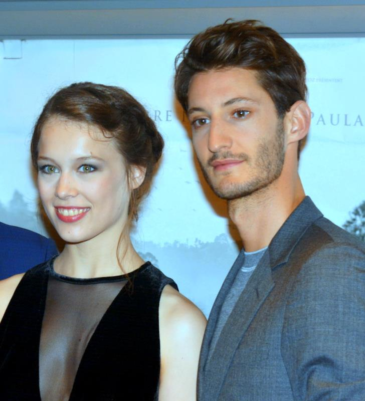 Paula Beer et Pierre Niney à l'avant-première parisienne de "Frantz"